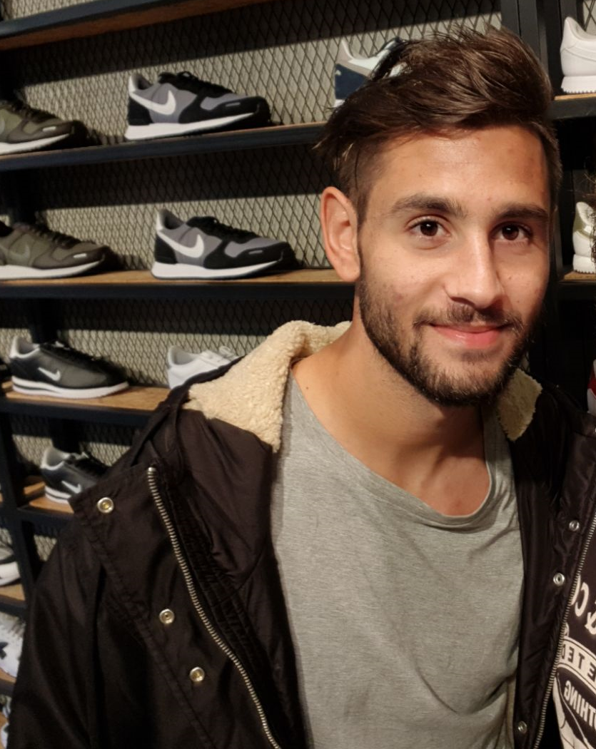 גאטאן אנתוני וארן שחקנה של ביתר ירושלים